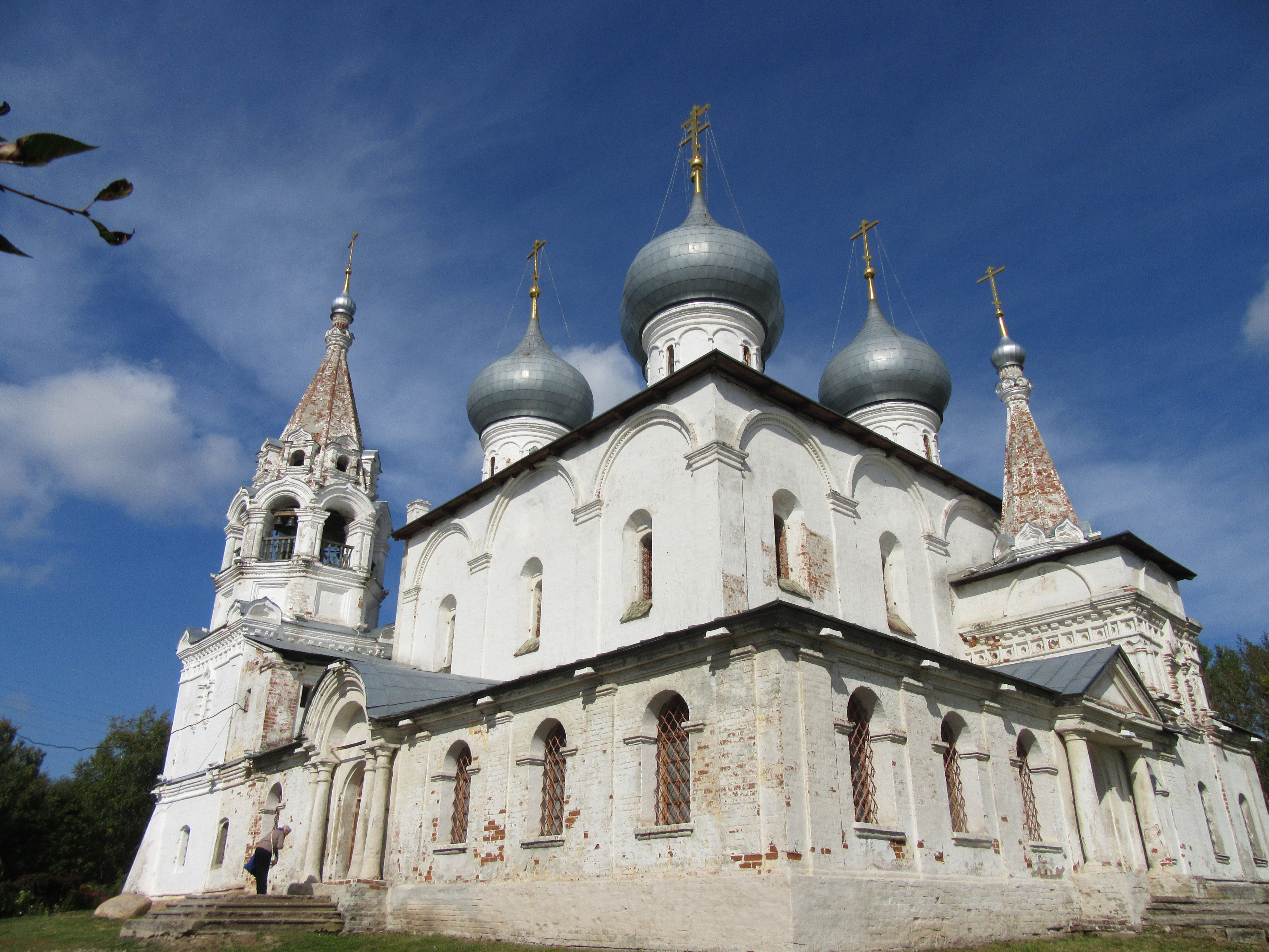 Vue du clocher et d'un angle de la cathédrale de l'Élévation à Toutaïev